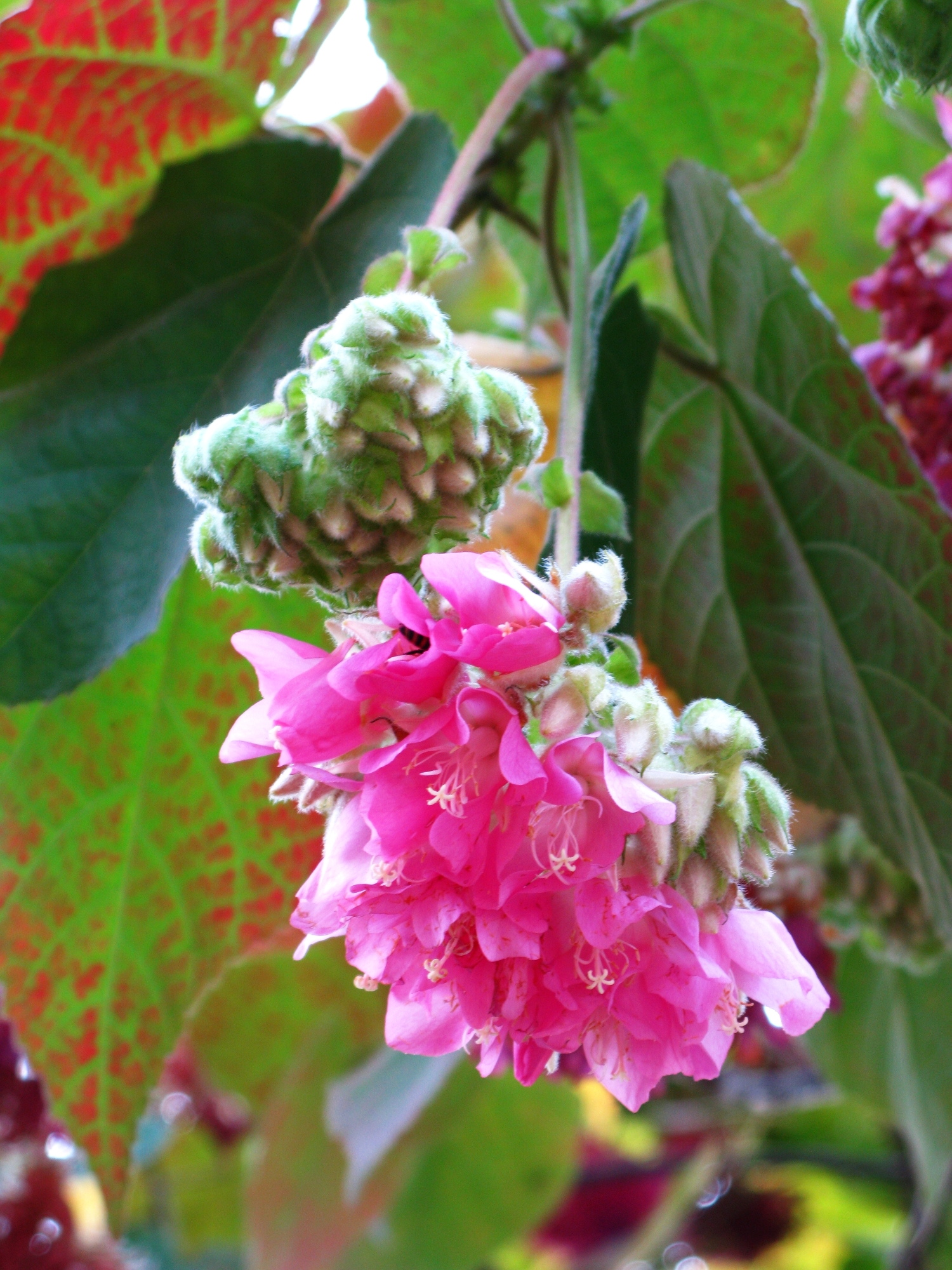 Pinkball (Dombeya Wallichii) in Hong Kong